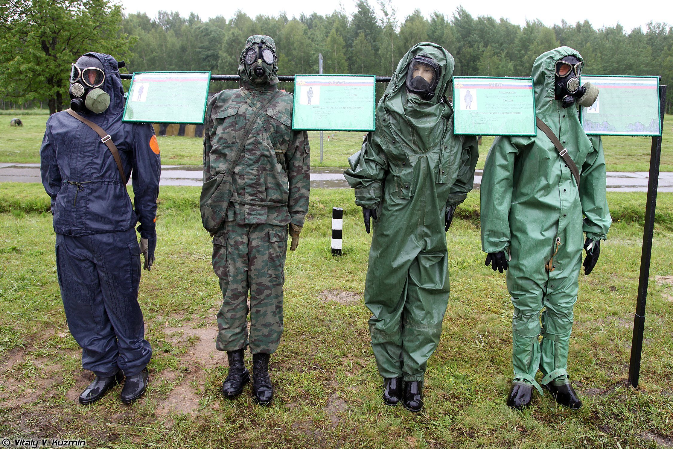 Защитные комплекты ФЗО-Р, ОЗК-Ф, КЗВП и ОЗК (NBC suits PhZO-R, OZK-Ph, KZVP, OZK)